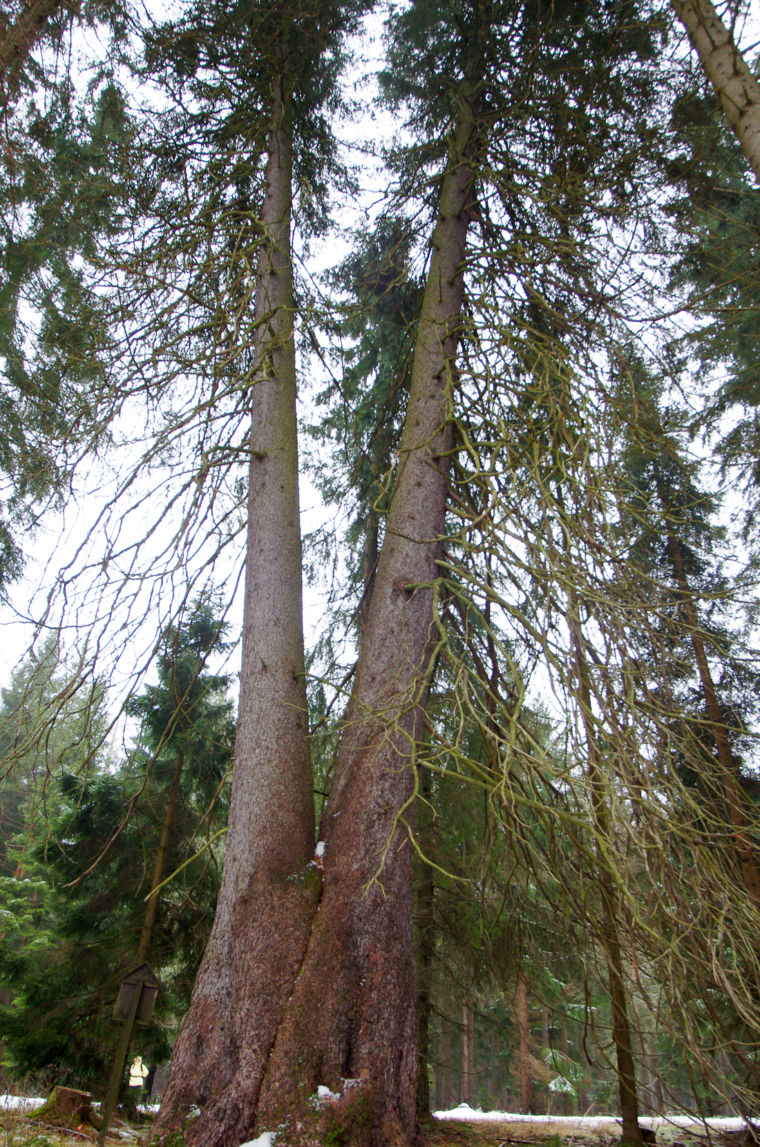 Šindelová, Krušné hory, dvojitý smrk, památný strom na okraji smrčiny vlevo od cesty, která spojuje zámeček Favorit s chráněnou modřínovou alejí; smrkový dvojkmen, jehož oba rovnocenné kmeny spolu srostly od paty až do dvoumetrové výšky, výška 35 m, obvod kmene 459 cm (údaje z roku 2004)